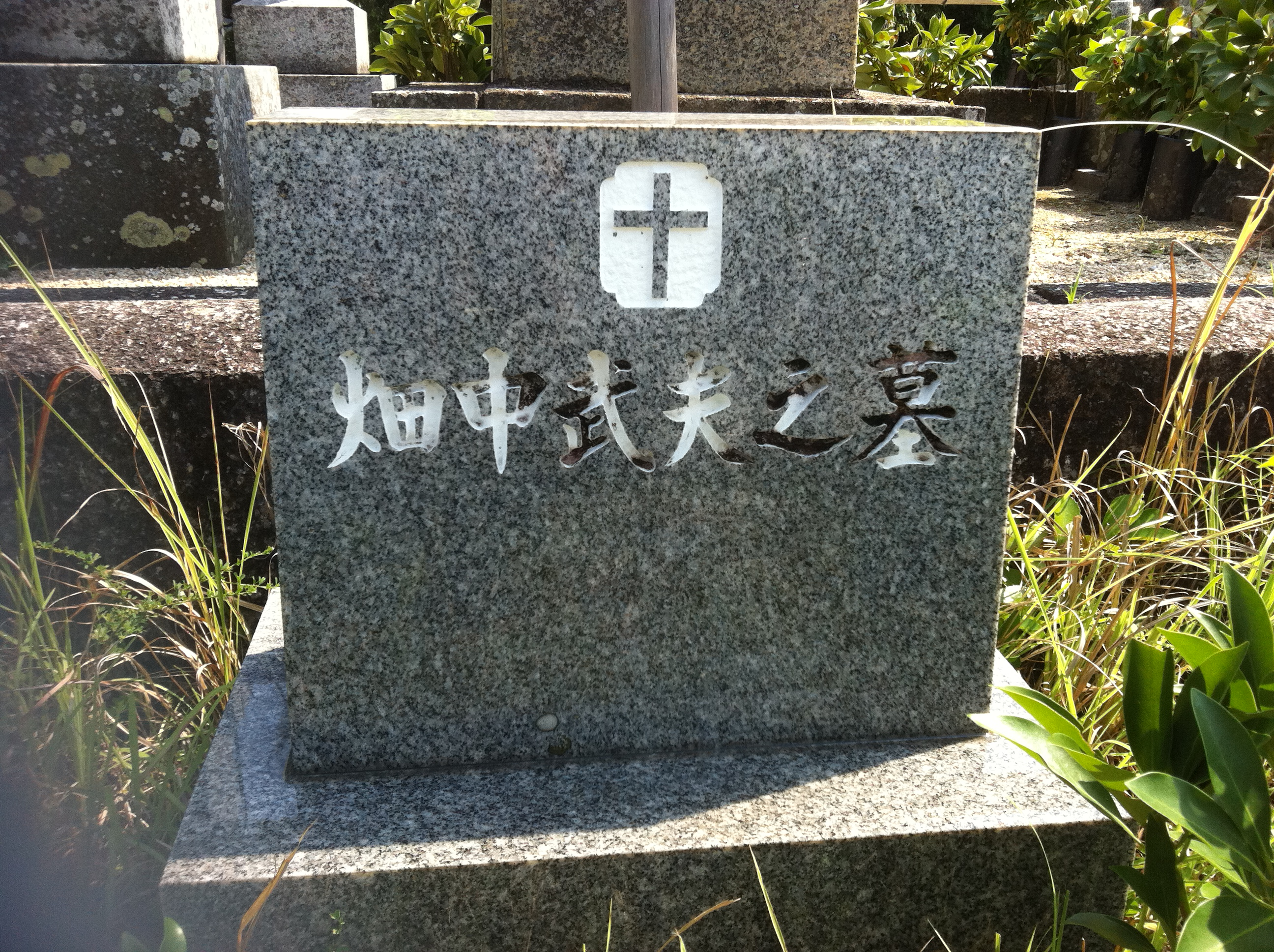 撮影 畑中琢磨